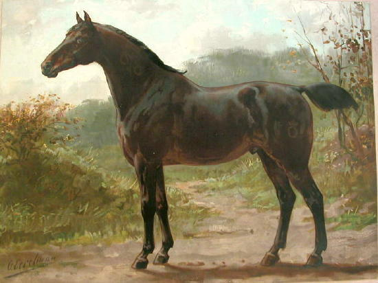 Alt-Oldenburger horse